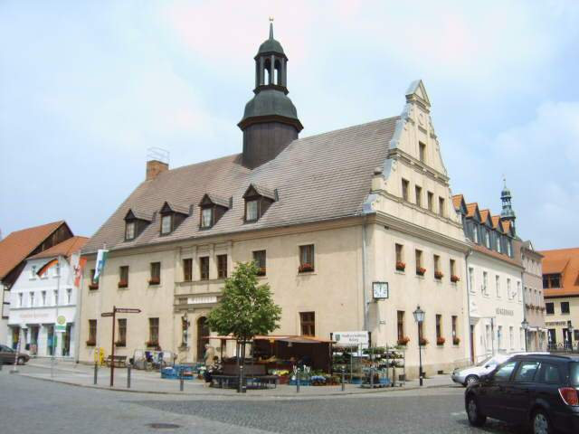 Rathaus Belzig, Land Brandenburg, Deutschland, Bild aufgenommen am 17.6.2006 von Olaf Meister